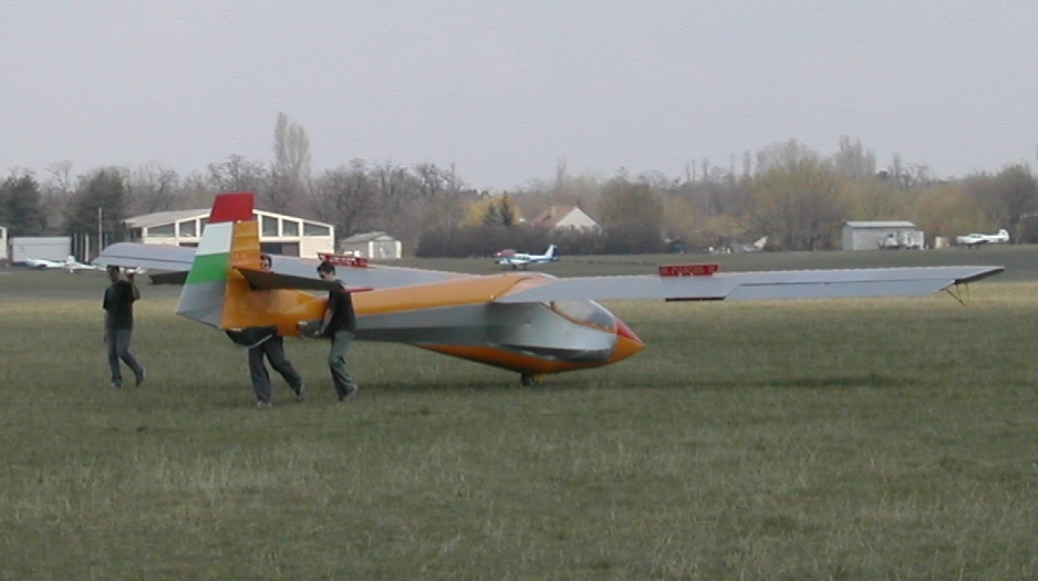 R–26 Góbé visszatolása a starthelyre (Dunakeszi)